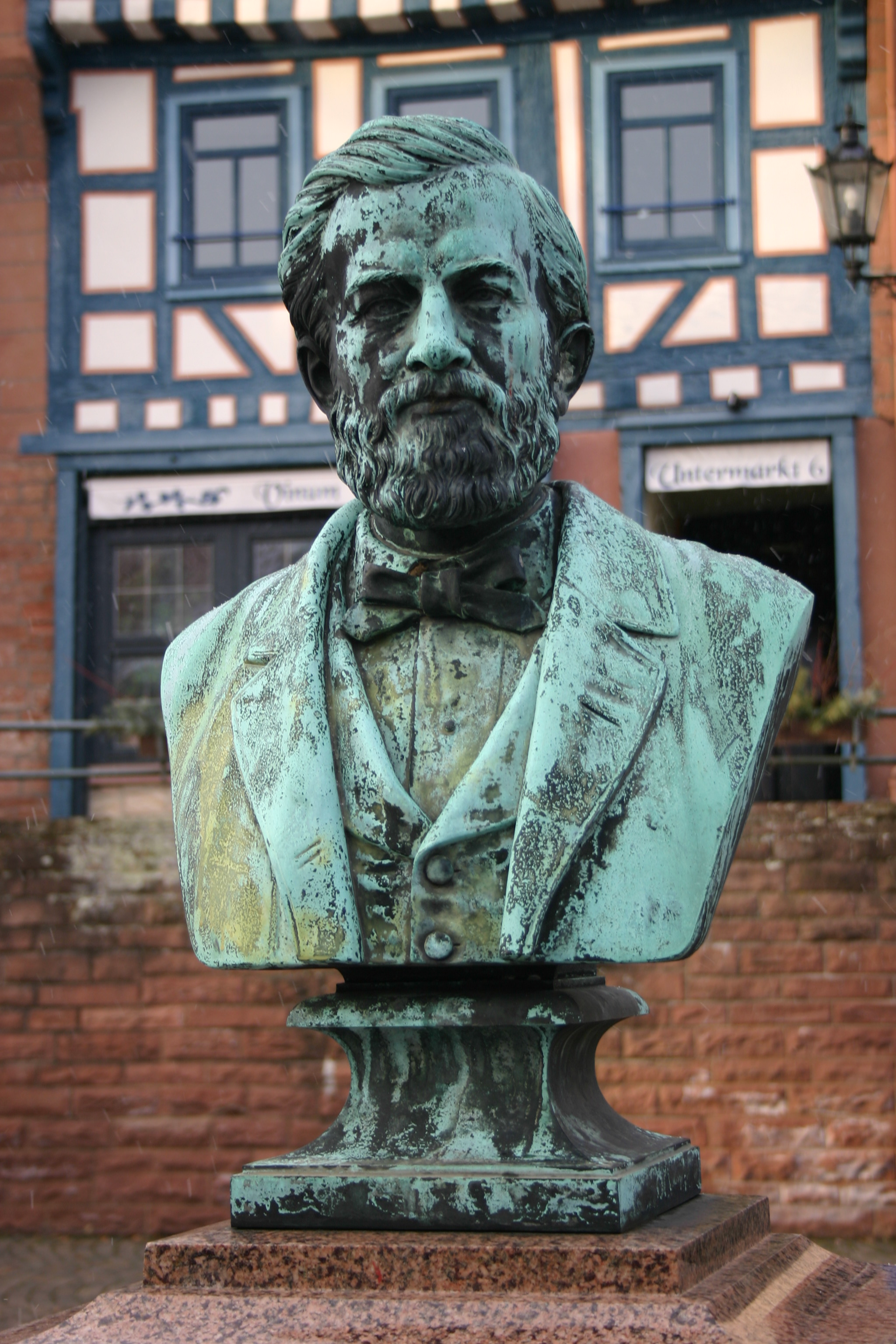 Bronze von Johann Philipp Reis in Gelnhausen. Bildhauer Anton Karl Rumpf. Inschrift auf der Rückseite: "A. C. Rumpf. fec. 1884" Ursprung: Selbst fotografiert von Sven Teschke am 27. Februar 2005 Lizenzstatus: GNU FDL